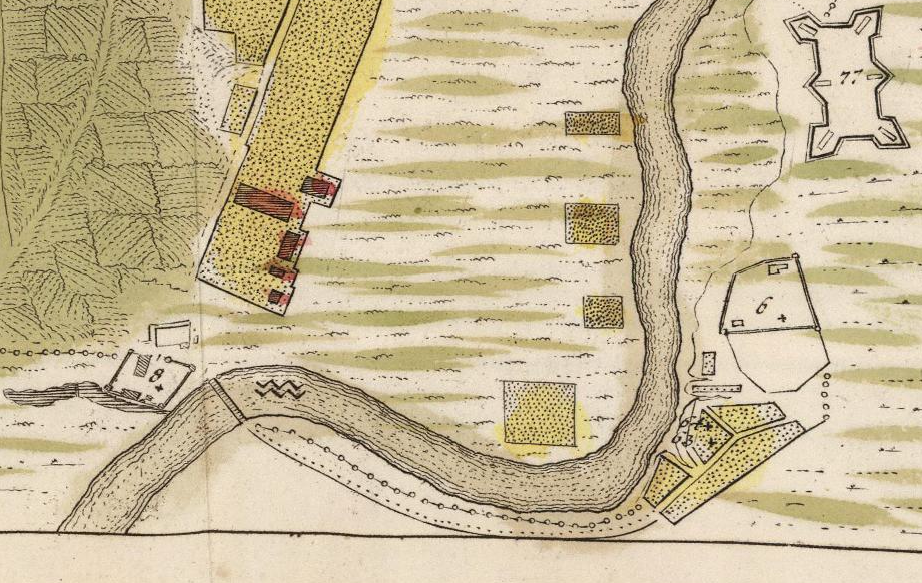 Тюфелева роща на Мичуринском плане Москвы.